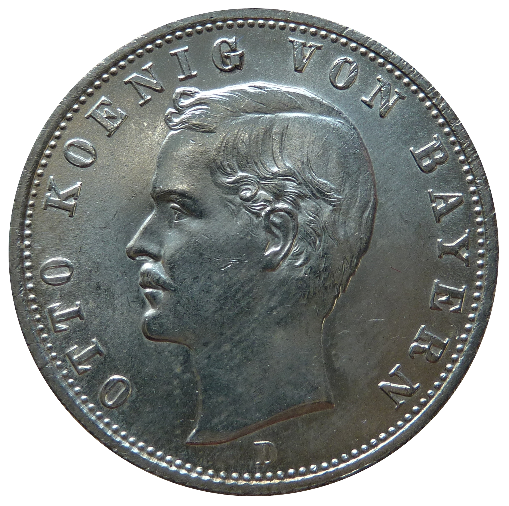 Vorderseite der 2-Mark-Münze des Königreichs Bayern mit dem Porträt von König Otto